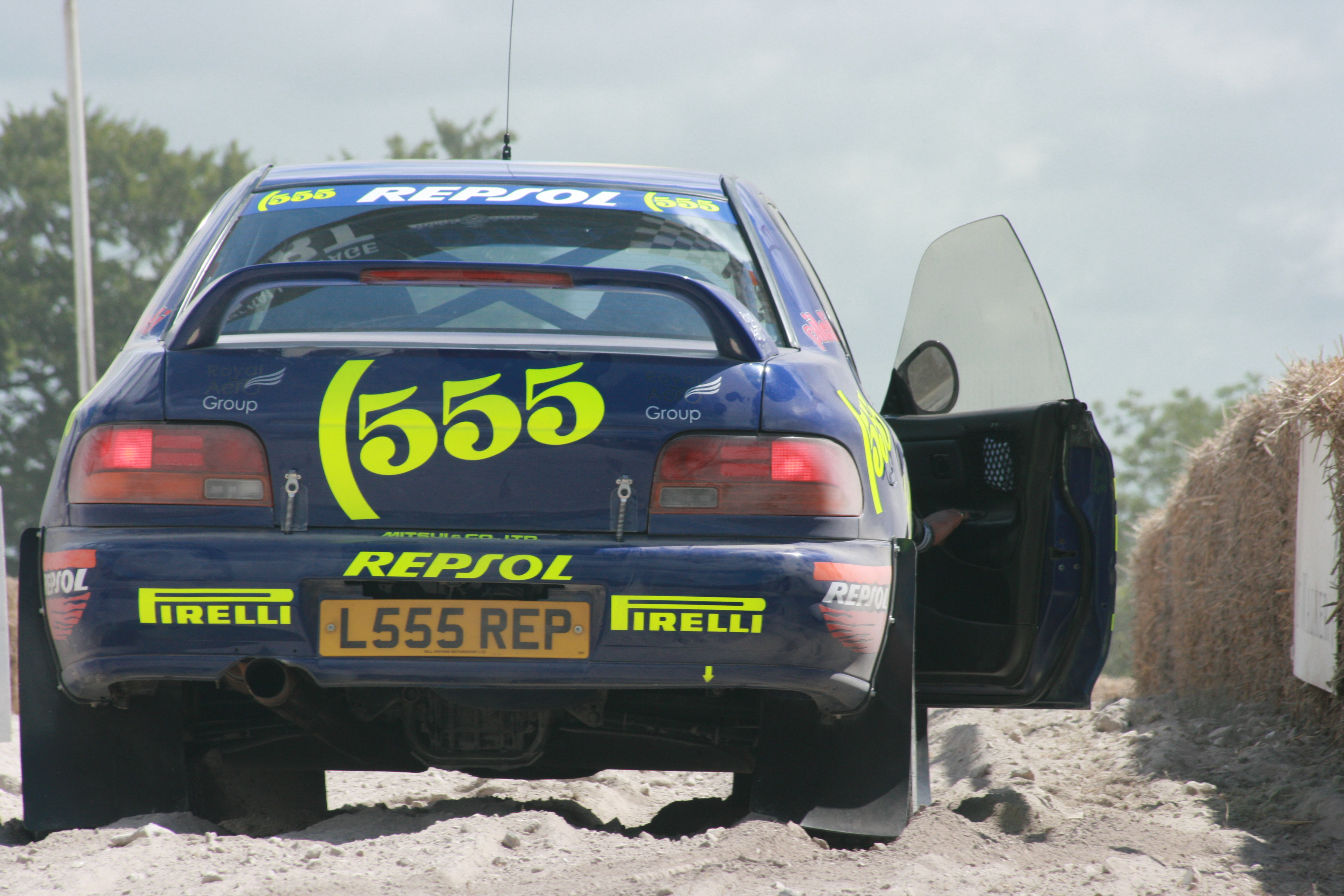 Iconic Subaru Impreza WRC